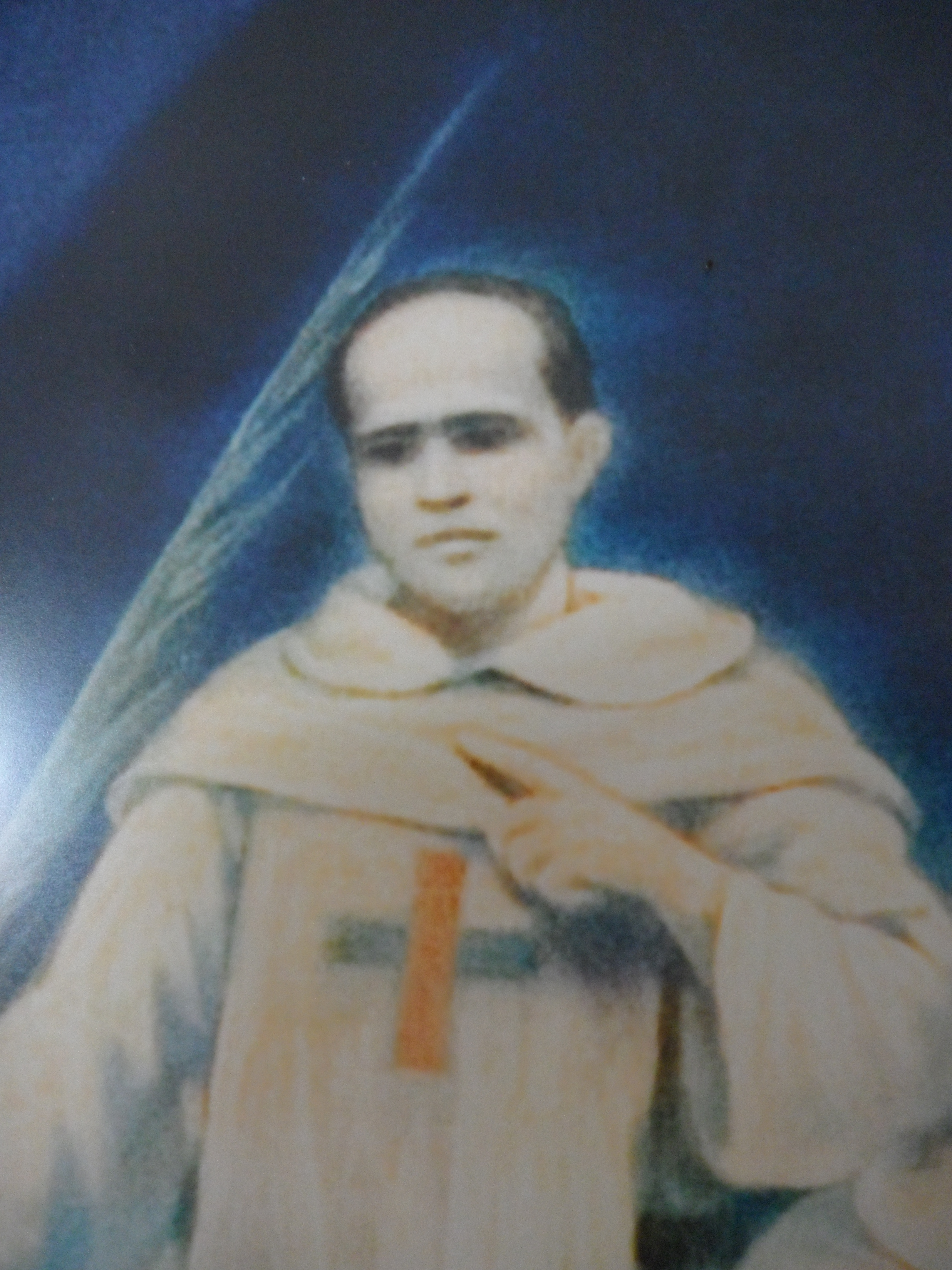 Particular del lienzo con motivo a la beatificación de Mariano de San José y compañeros mártires trinitarios. Convento de San Carlo alle Quattro Fontane.